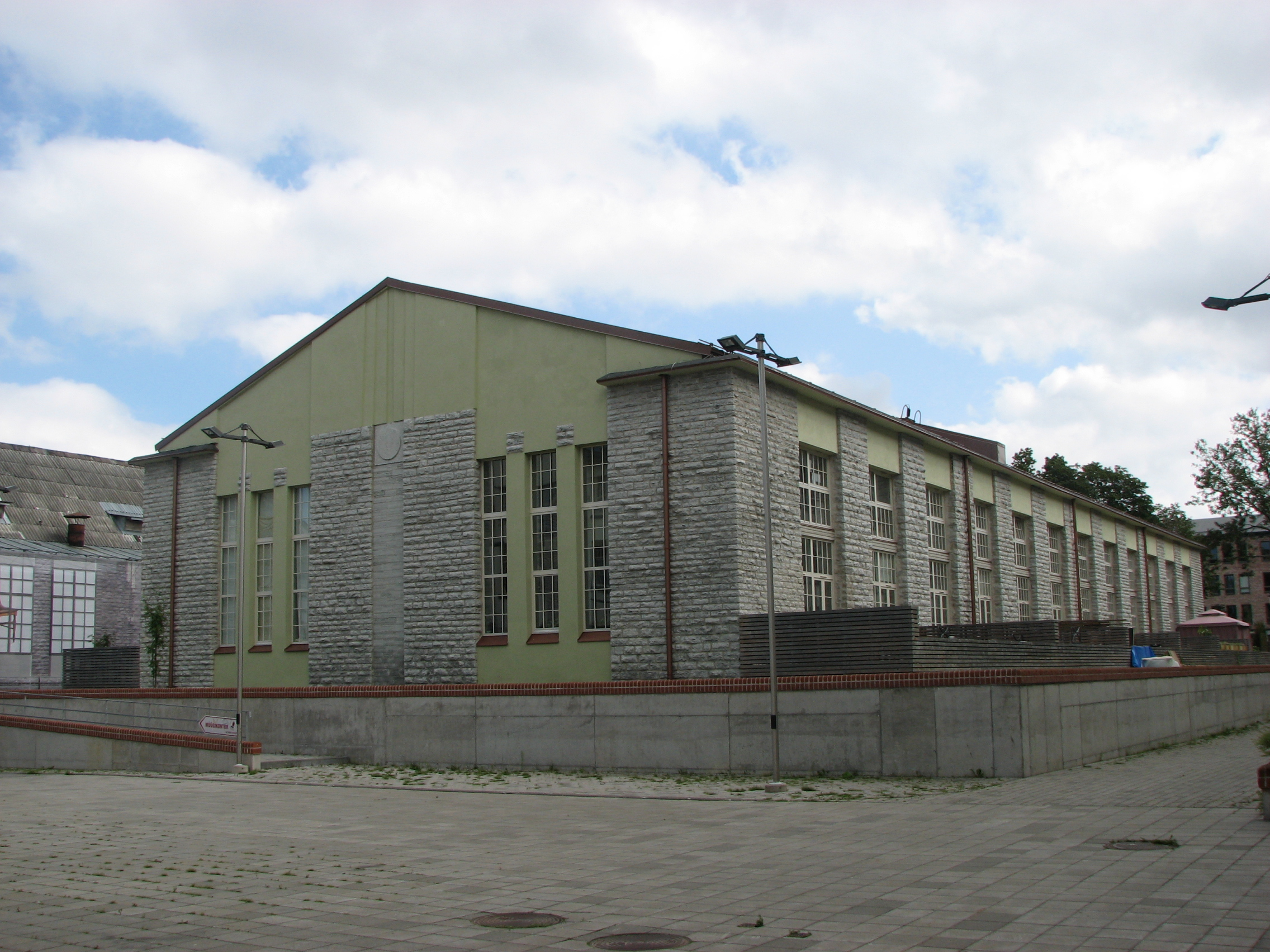 A.M.Luther Vineeri- ja Mööblivabriku tootmishoone uue vabrikuhoone hoovis, 1912. aastast. Vana-Lõuna 39a Tallinnas